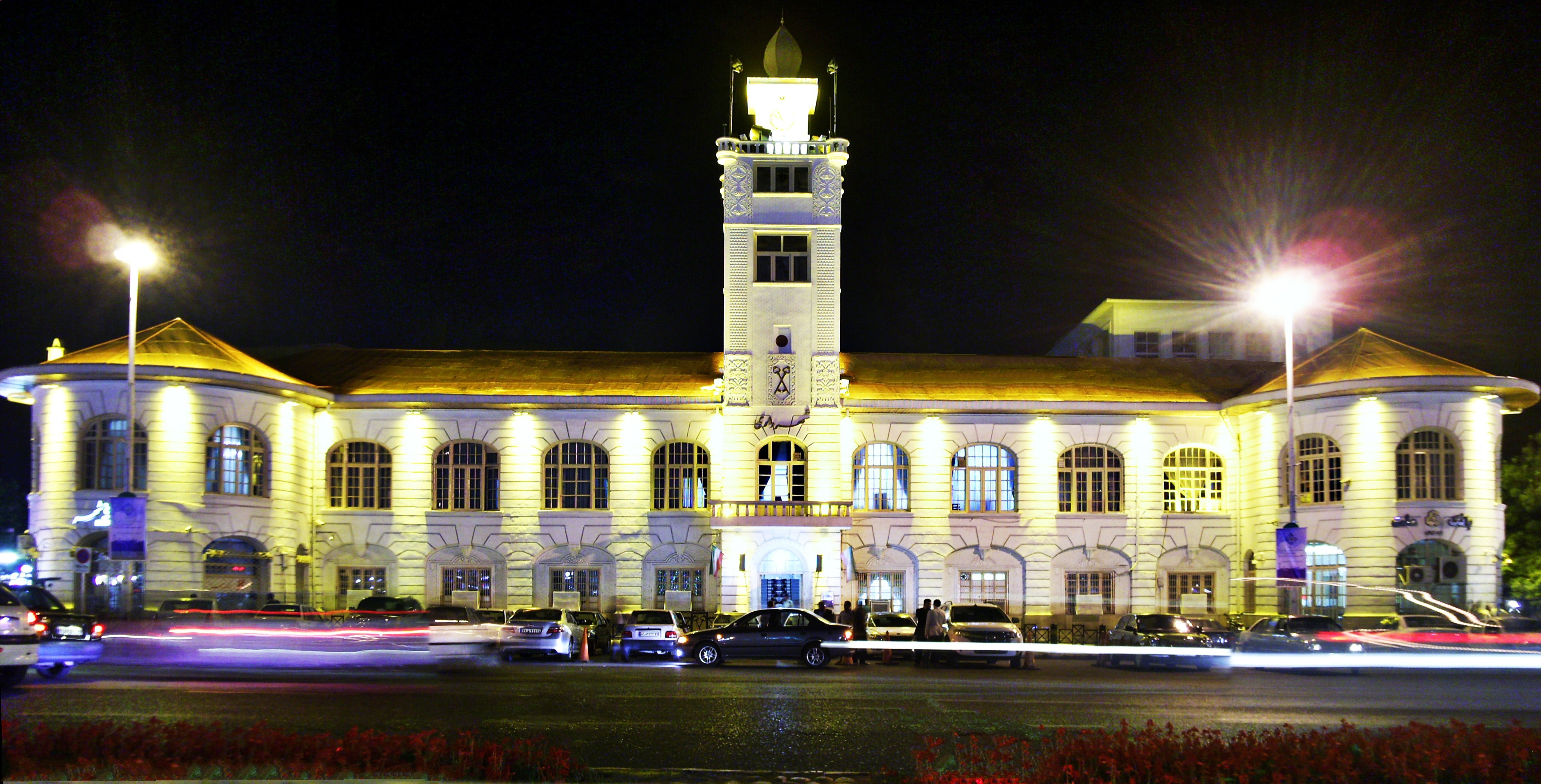 مجموعه ی میدان شهرداری رشت شامل ساختمان شهرداری و برج ساعت آن که نماد شهر رشت و نیز موزه پست و ساختمان قدیمی هتل ایران می‌باشد. مجموعه بناهای میدان شهرداری رشت در اوایل سلطنت رضا شاه پهلوی (۱۳۰۴-۱۳۲۰ ه. ش) احداث شده است. برج ساعت شهرداری که نماد شهر رشت محسوب می‌شود، به هنگام وقوع زلزله مهیب و ویرانگر گیلان در سال ۱۳۶۹ آسیب دیده بود که چندی بعد به صورت سابق بازسازی گردید. مجموعه شهرداری مربوط به دوره پهلوی است و در رشت، میدان شهرداری واقع شده و این اثر در تاریخ ۲۶ آذر ۱۳۵۶ با شمارهٔ ثبت ۱۵۱۶ به‌عنوان یکی از آثار ملی ایران به ثبت رسیده است.